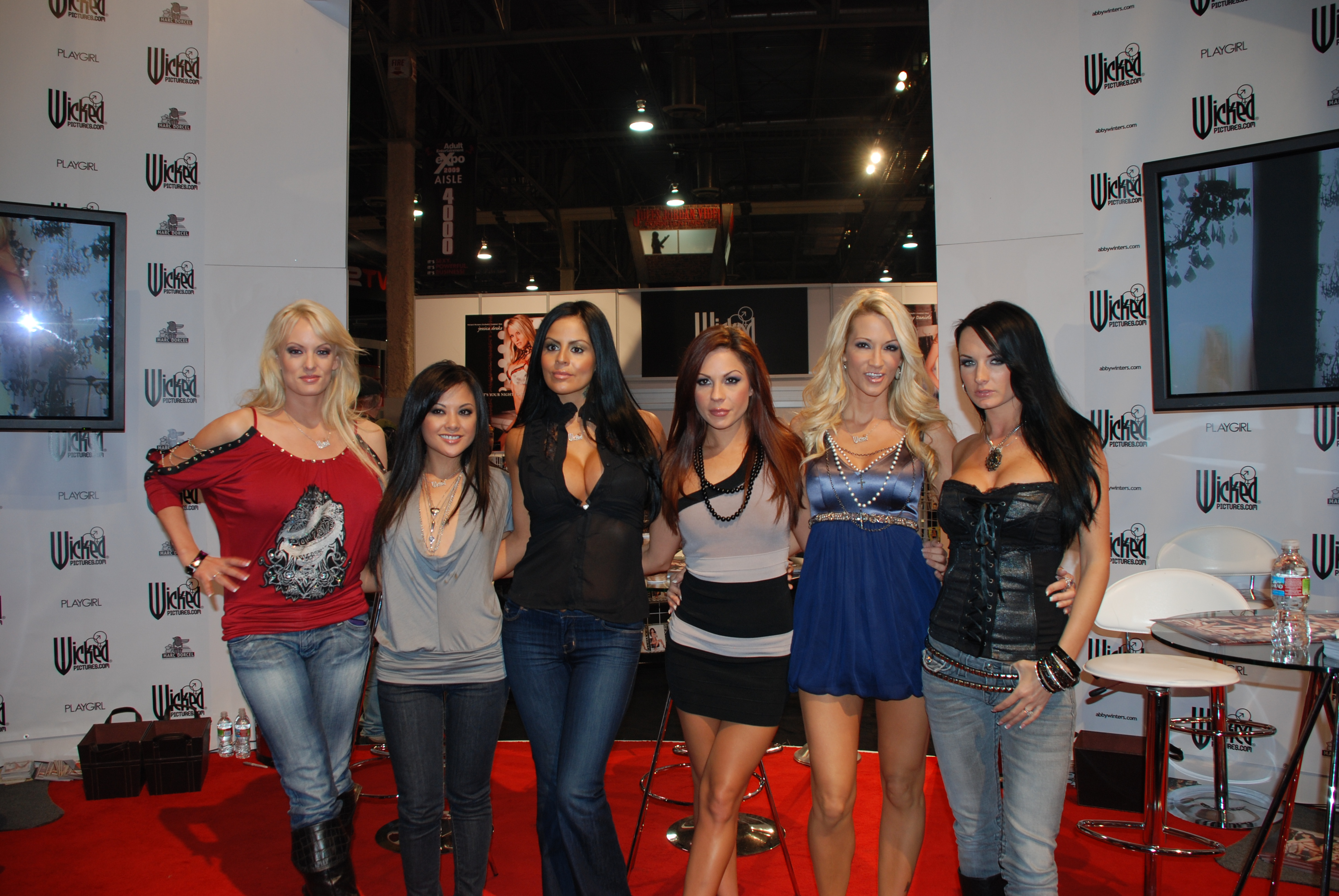 (L-R) Stormy Daniels, Kaylani Lei, Mikayla Mendez, Kirsten Price, Jessica Drake and Alektra Blue